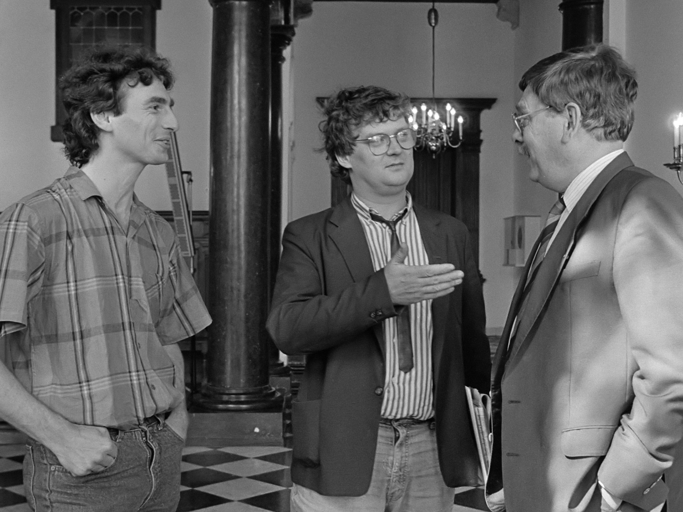 Overleg stukgoed CAO onder voorzitterschap Gerard Krul ( Vrije Volk ) in Delft; voor aanvang v.l.n.r. Paul Rosenmoller (FNV), Gerard Krul en Zeebregt 2 juli 1987